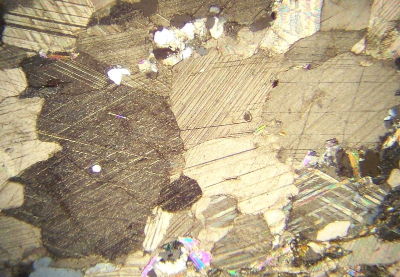 Płytka cienka marmuru